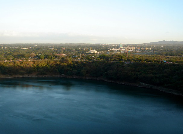 Vista de la Laguna de Tiscapa con el Nuevo Centro de Mangua de Fondo